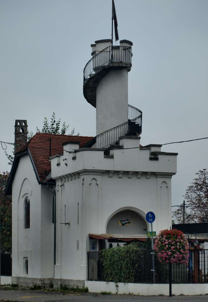 Kőbányai Csősztorony. Zofahl Lőrinc tervei alapján Brein Ferenc vezetésével épült 1844-ben This is a photo of a monument in Hungary, Identifier: 1080